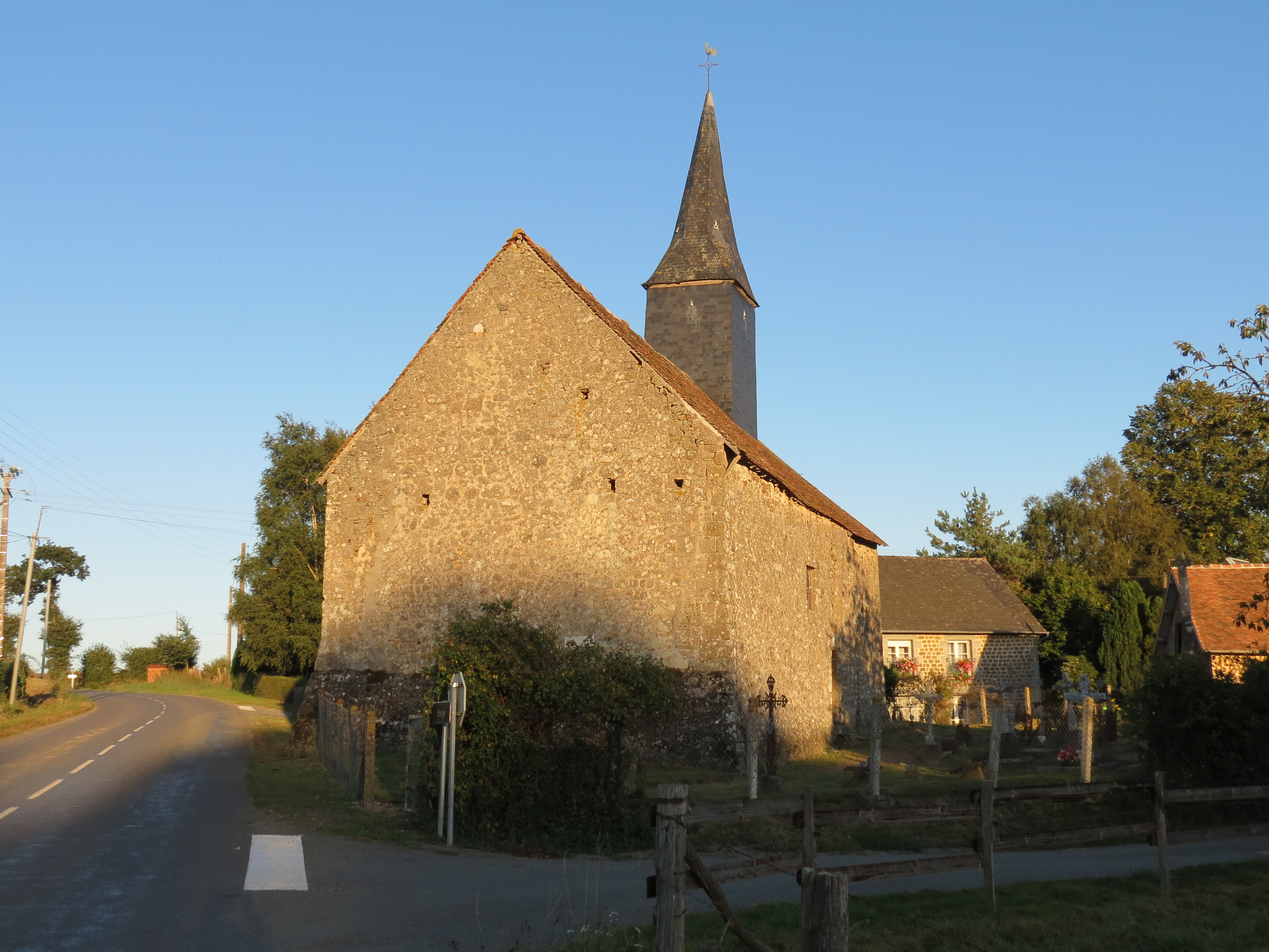 Chapelle Notre-Dame d'Étrigé, Sept-Forges (Orne, Normandie, France).